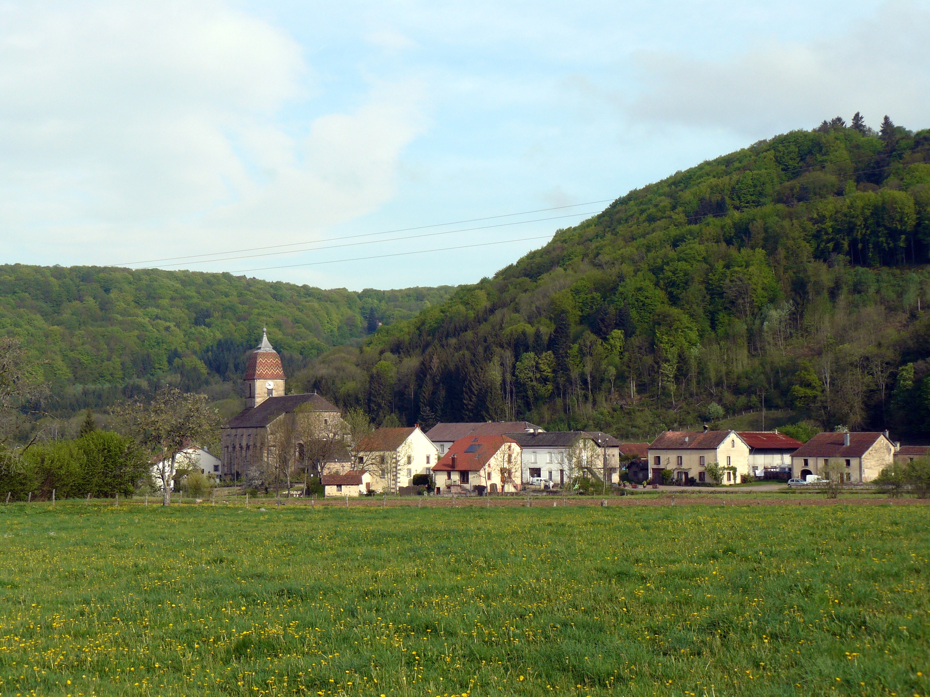 Vue du centre de Saint-Bresson (Haute-Saône, France)